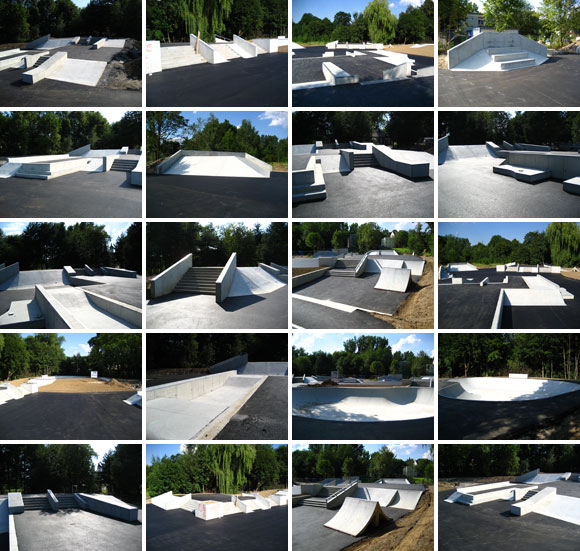 Skateplaza Plauen Details